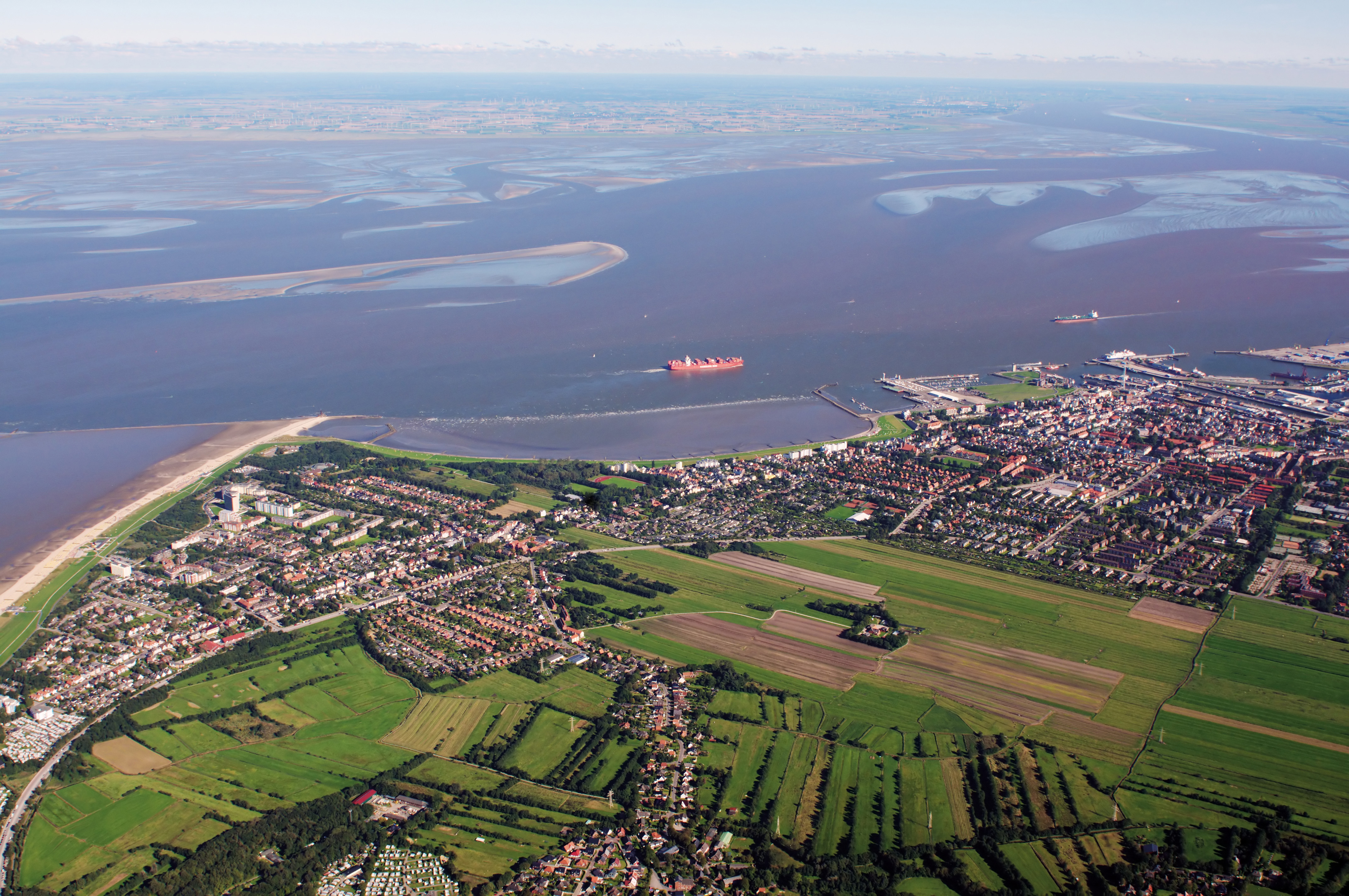 Fotoflug über das nordfriesische Wattenmeer: Cuxhaven, Elbmündung (von W)